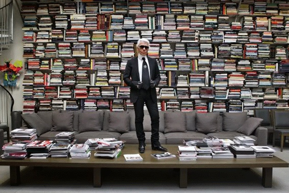 Karl Lagerfeld in der Bücherei. Ein Werk von Stefan Strumbel